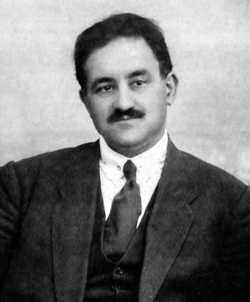 Məhəmməd Əmin Rəsulzadə. Hyvinkaa, Finlandiya.